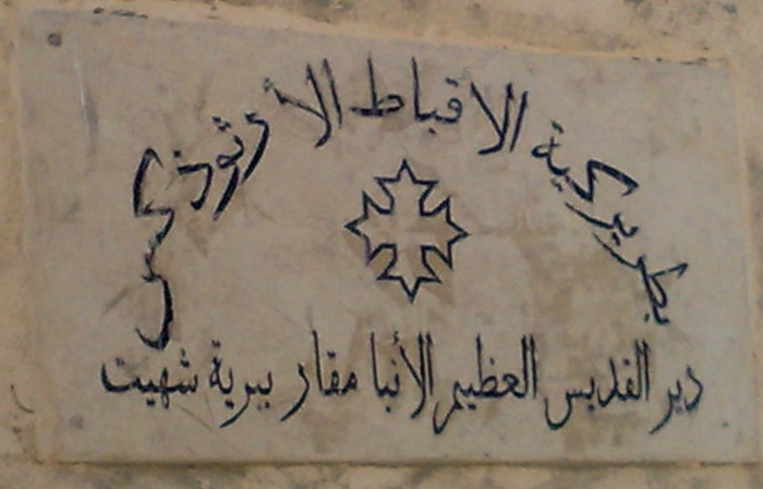 لافتة رخامية موضوعة على سور مدخل دير القديس أنبا مقار بوادي النطرون